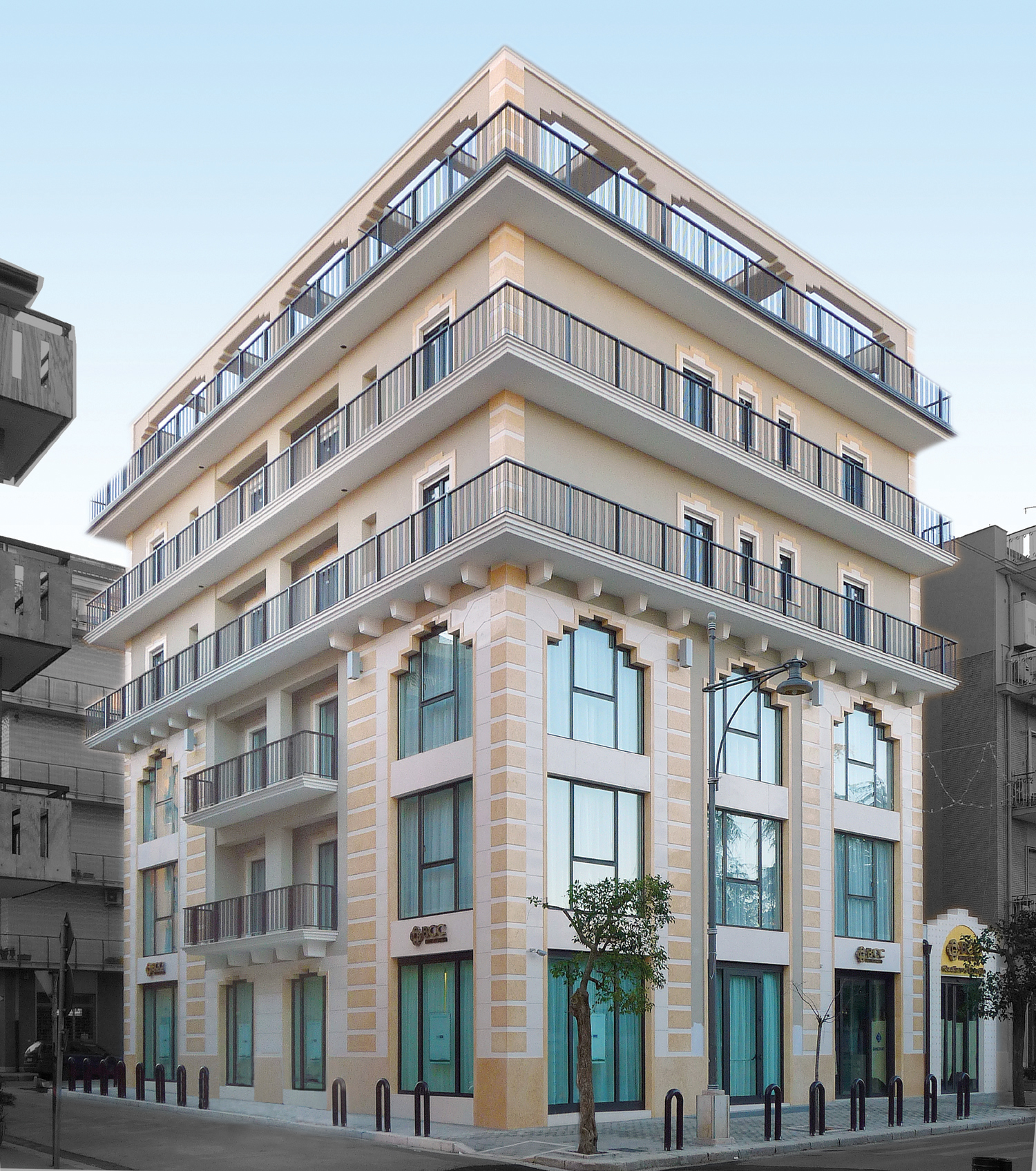 Sede centrale BCC Gaudiano di Lavello